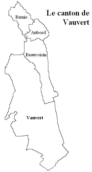 Le canton de Vauvert Image personnelle